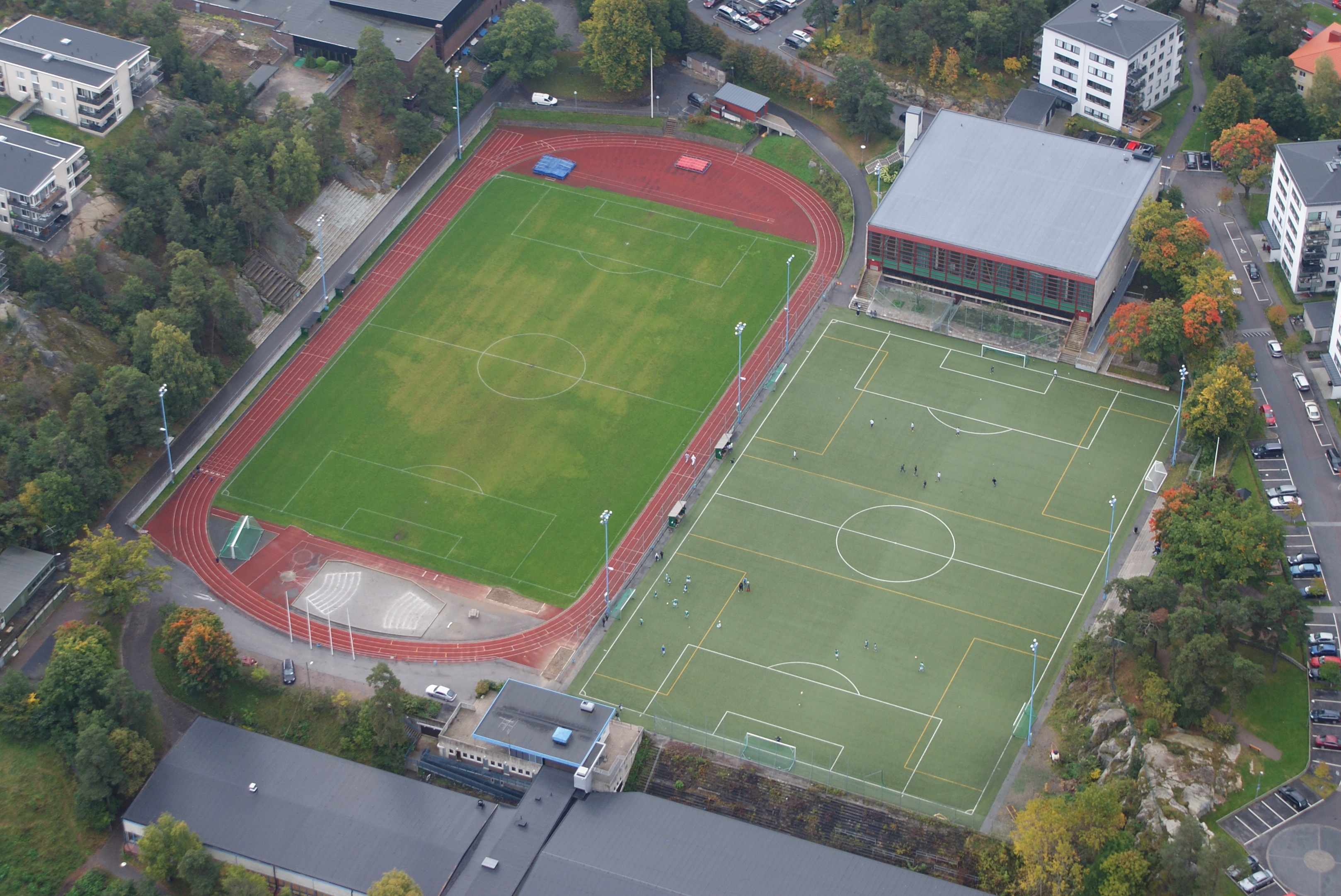 Sundbyberg IP sedd från helikopter.